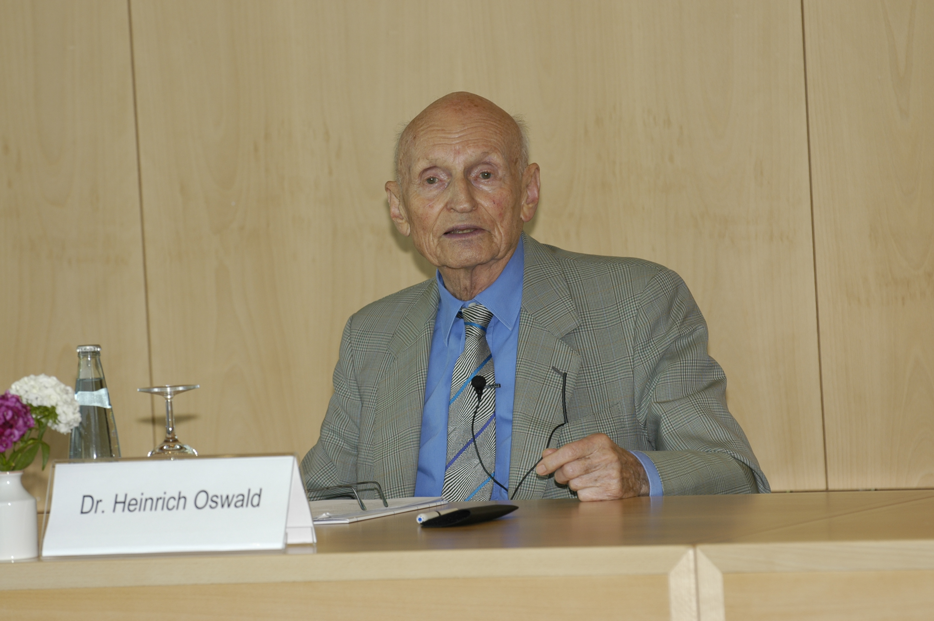 Portrait of Heinrich Oswald